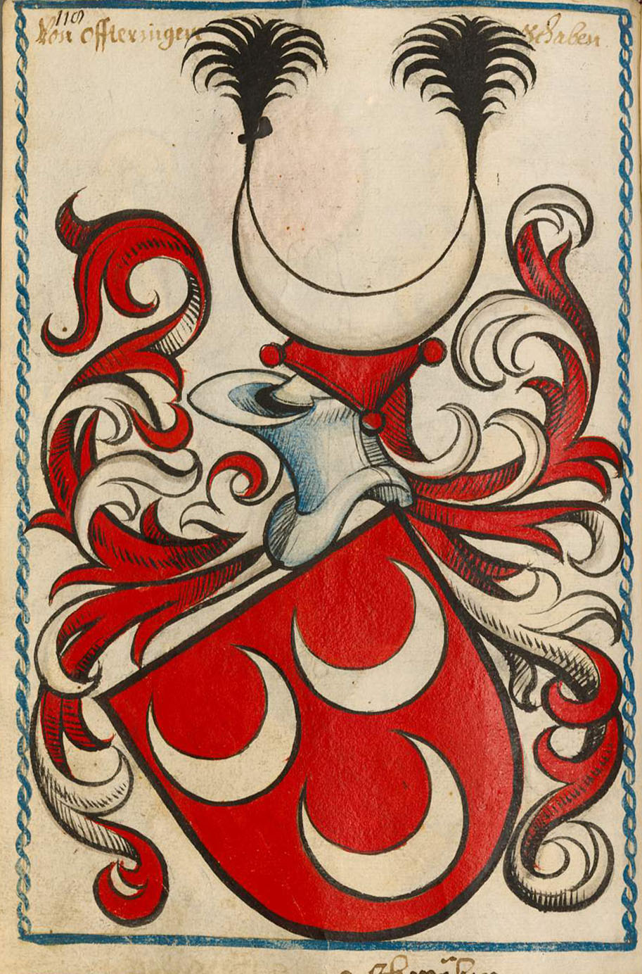 Scheibler'sches Wappenbuch, älterer Teil Ofterdingen